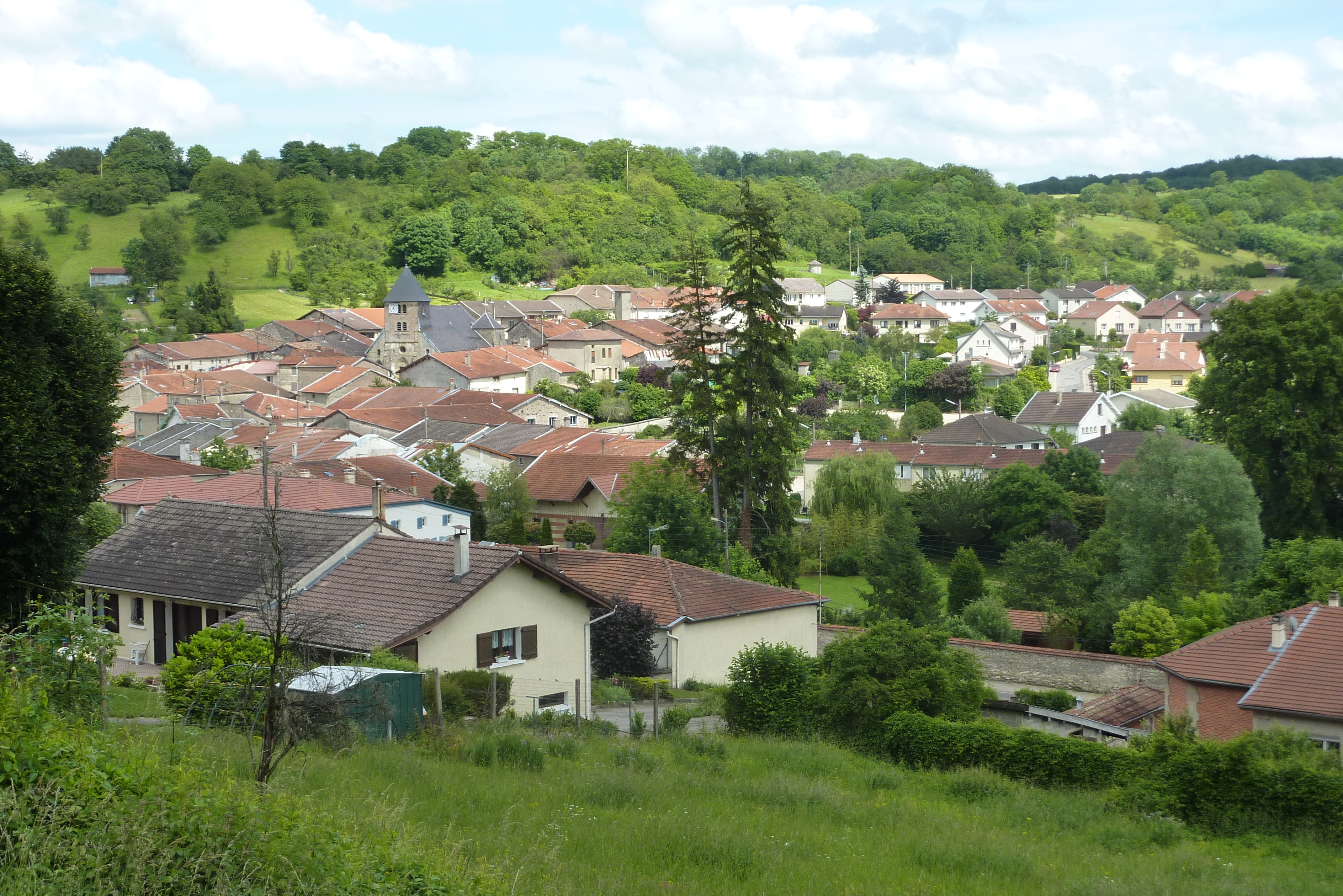 Village de Naives-devant-Bar (Commune de Naives-Rosières)